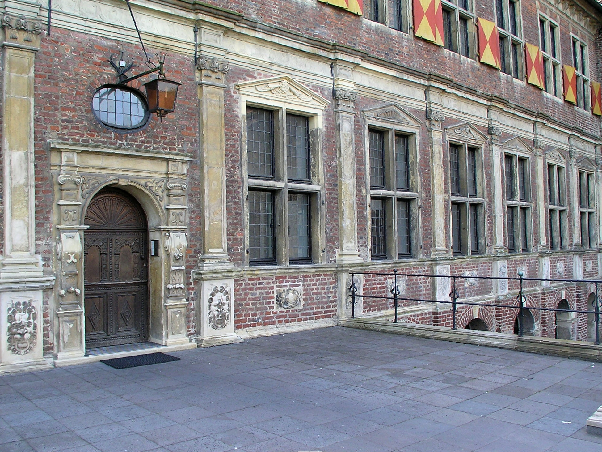 Westflügel von Schloss Raesfeld